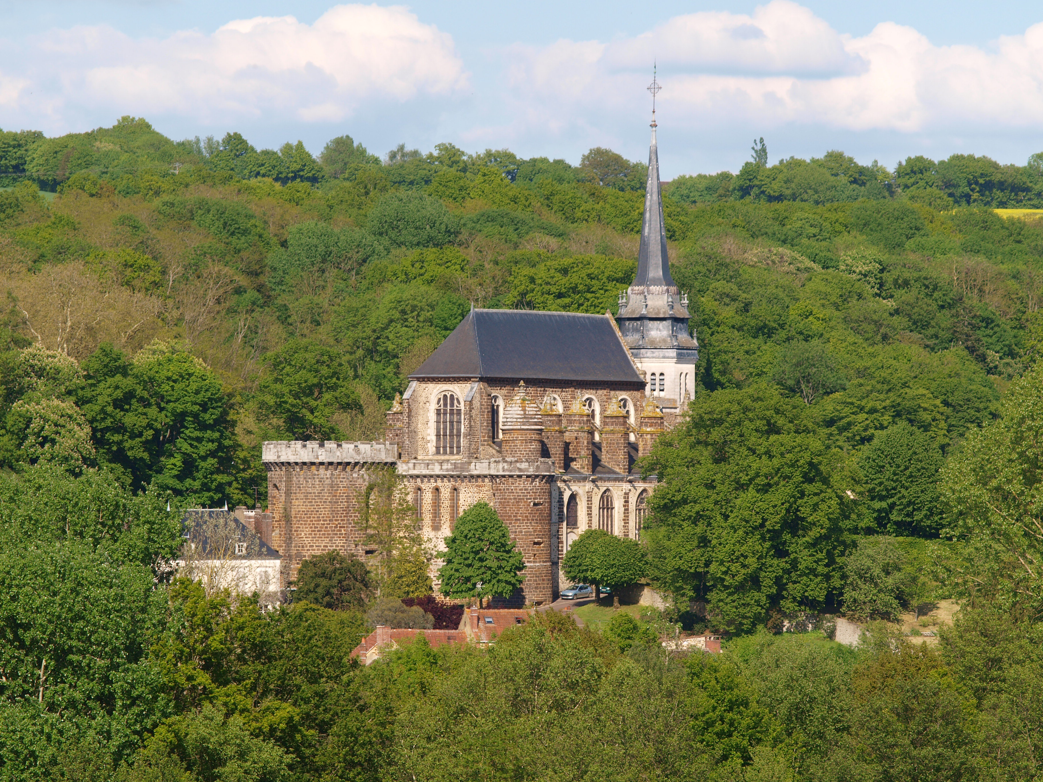 Toucy (Yonne, France) ; l'église vue du sud-est. La rivière Ouanne est à 15 ou 20 m plus bas, devant.